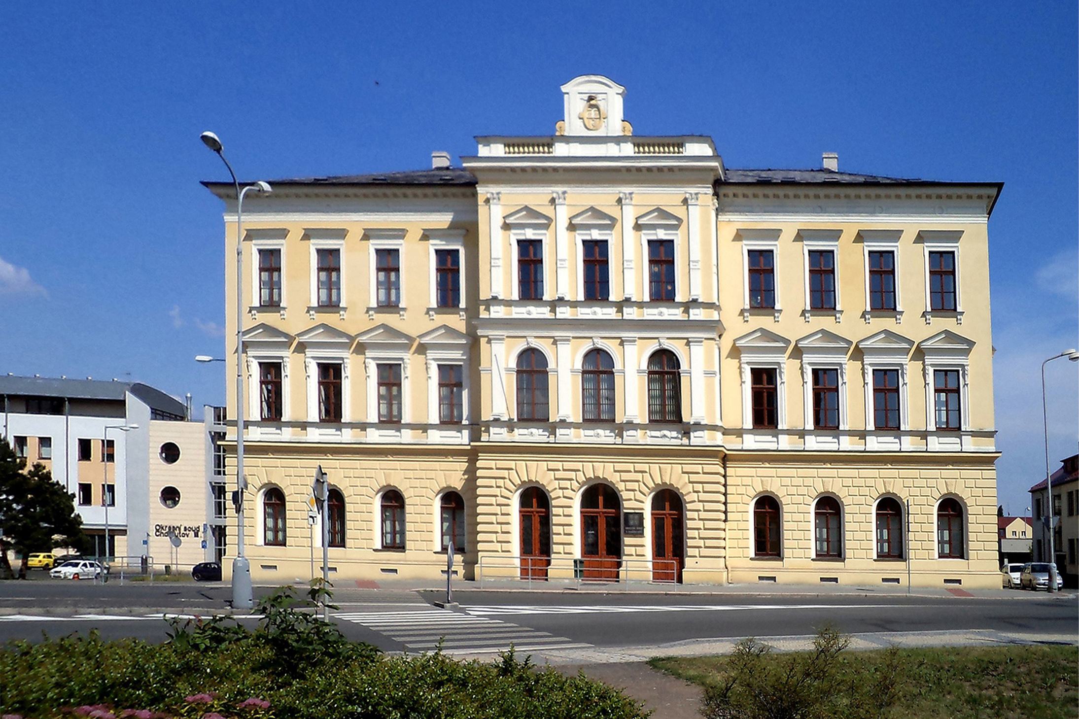 Chomutov, Na Příkopech 663, budova okresního soudu.